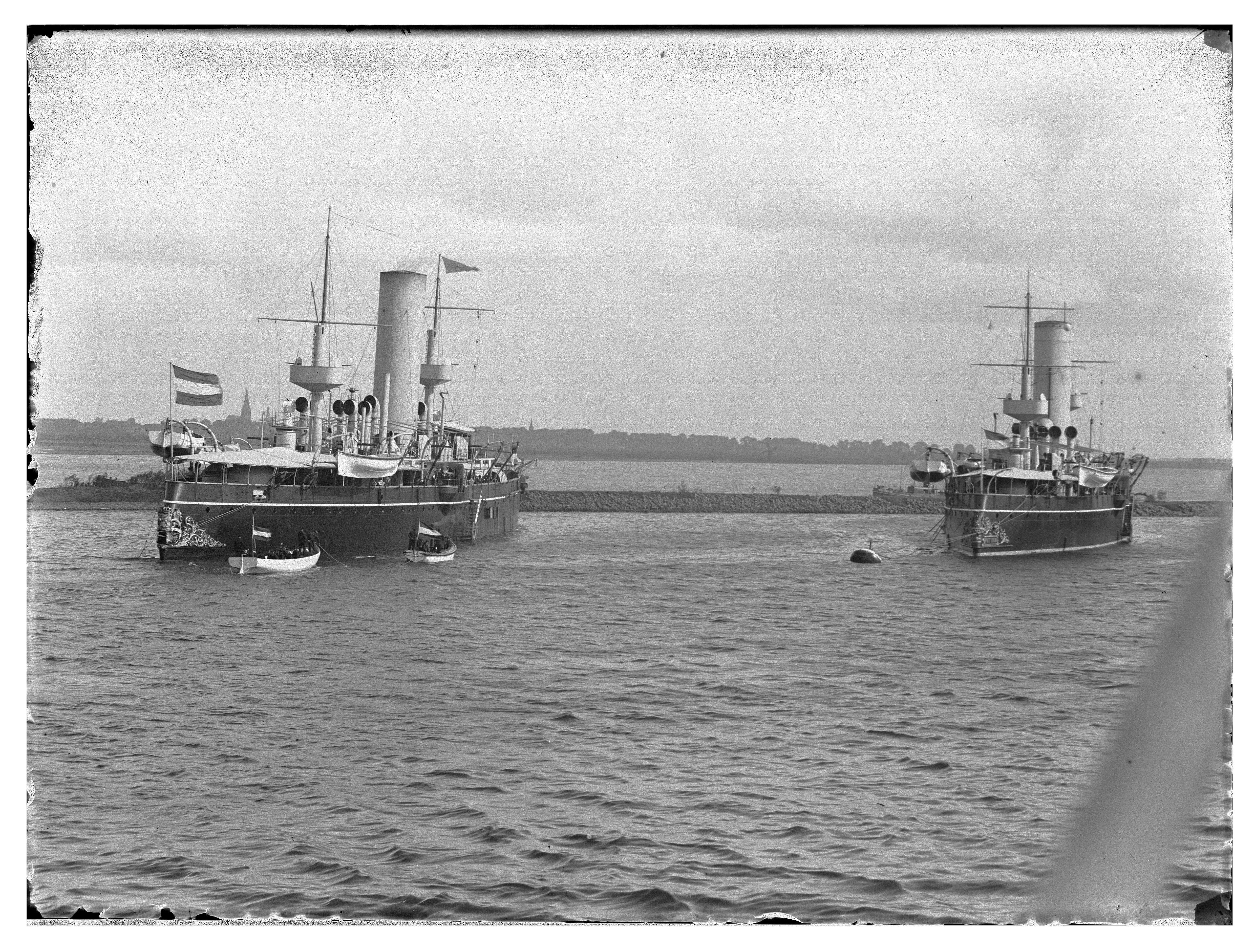 Beschrijving IJ (Afgesloten) Oorlogsbodems voor anker. Links: "Piet Heijn". Rechts: "Kortenaer" Documenttype foto Vervaardiger Olie``, Jacob (1834-1905) Collectie Collectie Jacob Olie Jbz. Datering 22 september 1896 Geografische naam IJ Inventarissen Afbeeldingsbestand 010019000928 Generated with Dememorixer